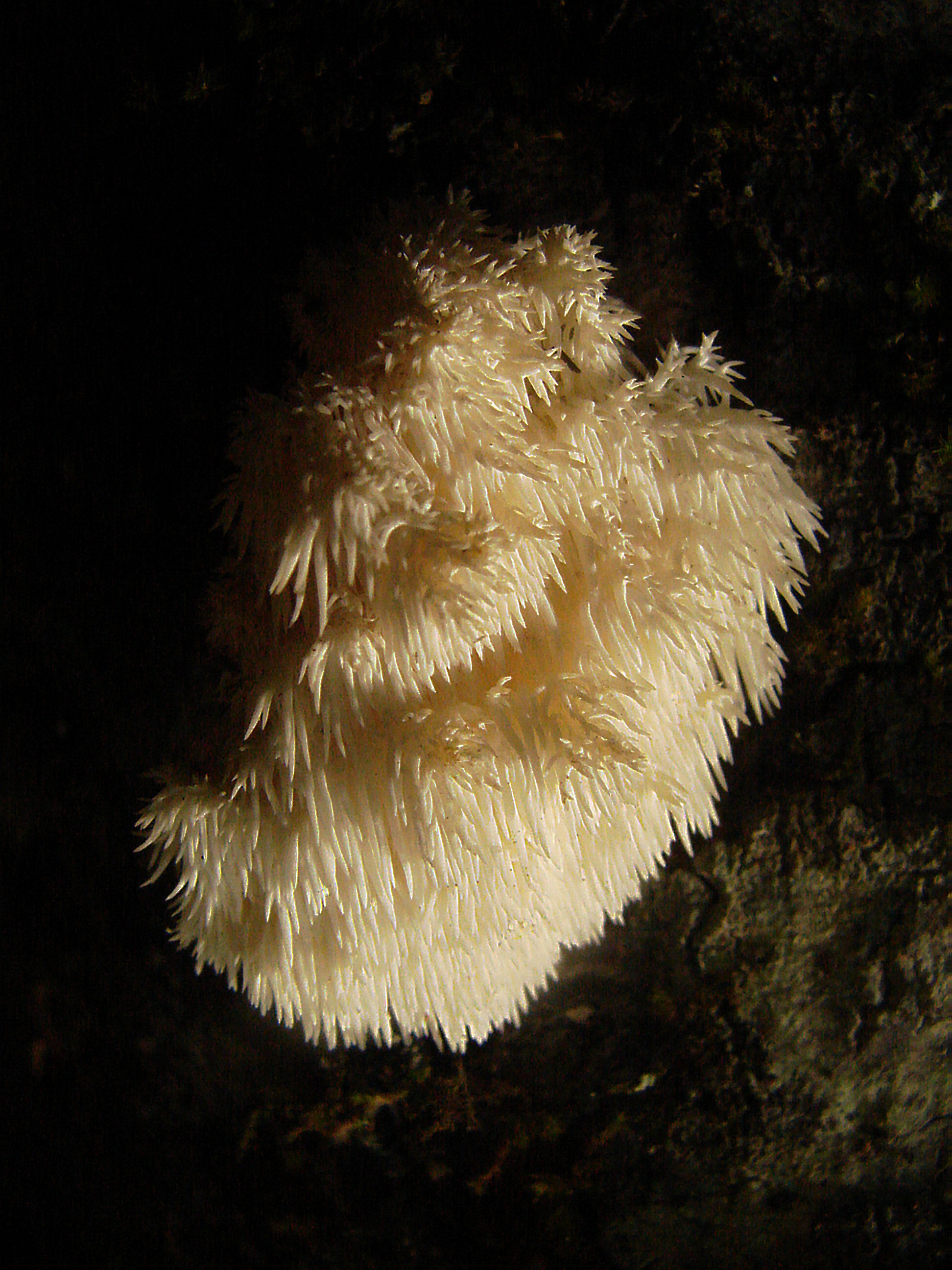 Hydnum coralloides, Local names: Sakal mantarı, Dede sakalı mantarı, Tellice mantari